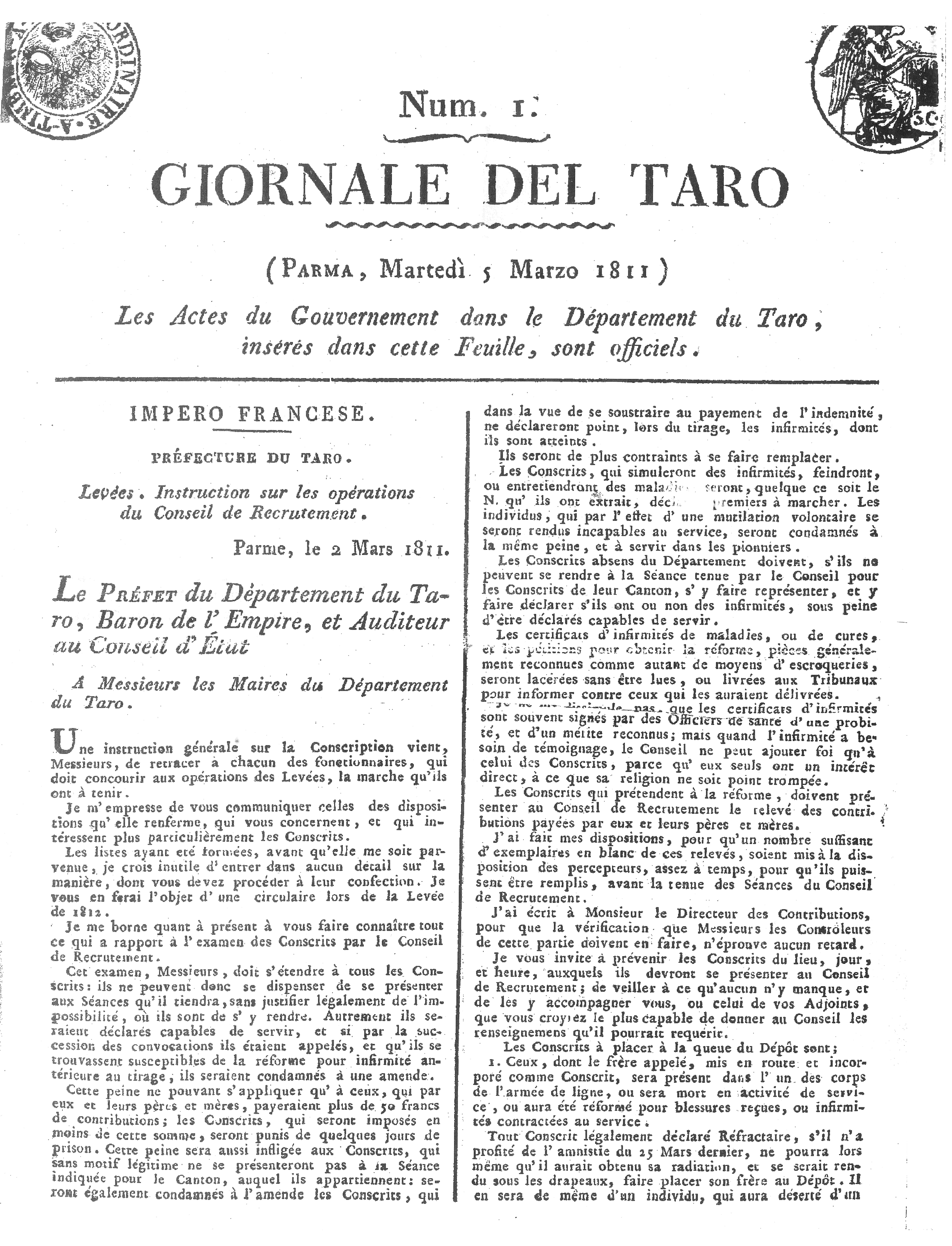 Édition du Giornale del Taro (de 1811 à 1814) qui remplace la Gazzetta di Parma alors que Parme est le département français du Taro